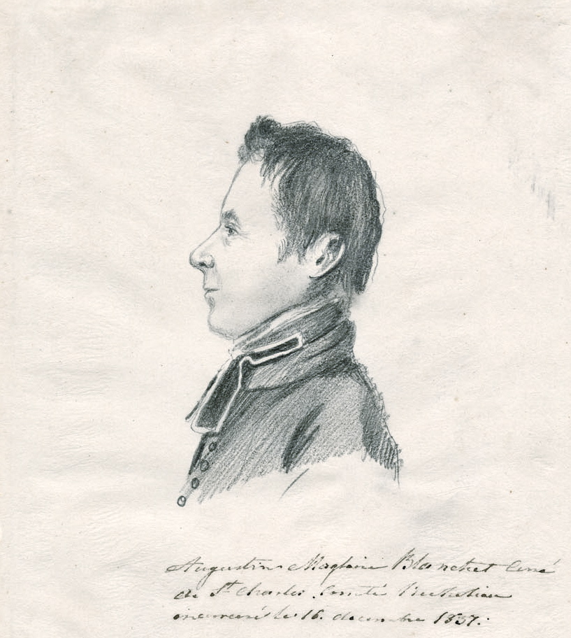 Portrait d'Augustin-Magloire Blanchet (1797-1887). Dessin au crayon, fusain et à l'estompe sur papier calque, par Jean-Joseph Girouard. Ce portrait a été dessiné par J.-J. Girouard en 1838 alors que les deux hommes étaient incarcérés par les Britanniques à la prison du Pied-du-Courant lors des révoltes démocratiques de 1837-1838 au Canada. A.-M. Blanchet était alors curé de Saint-Charles. A.-M. Blanchet fut incarcéré du 16 décembre 1837 au 31 mars 1838.L'inscription sous le dessin se lit :«Augustin Magloire Blanchet curéde St Charles comté Richelieuincarcéré le 16 décembre 1837».